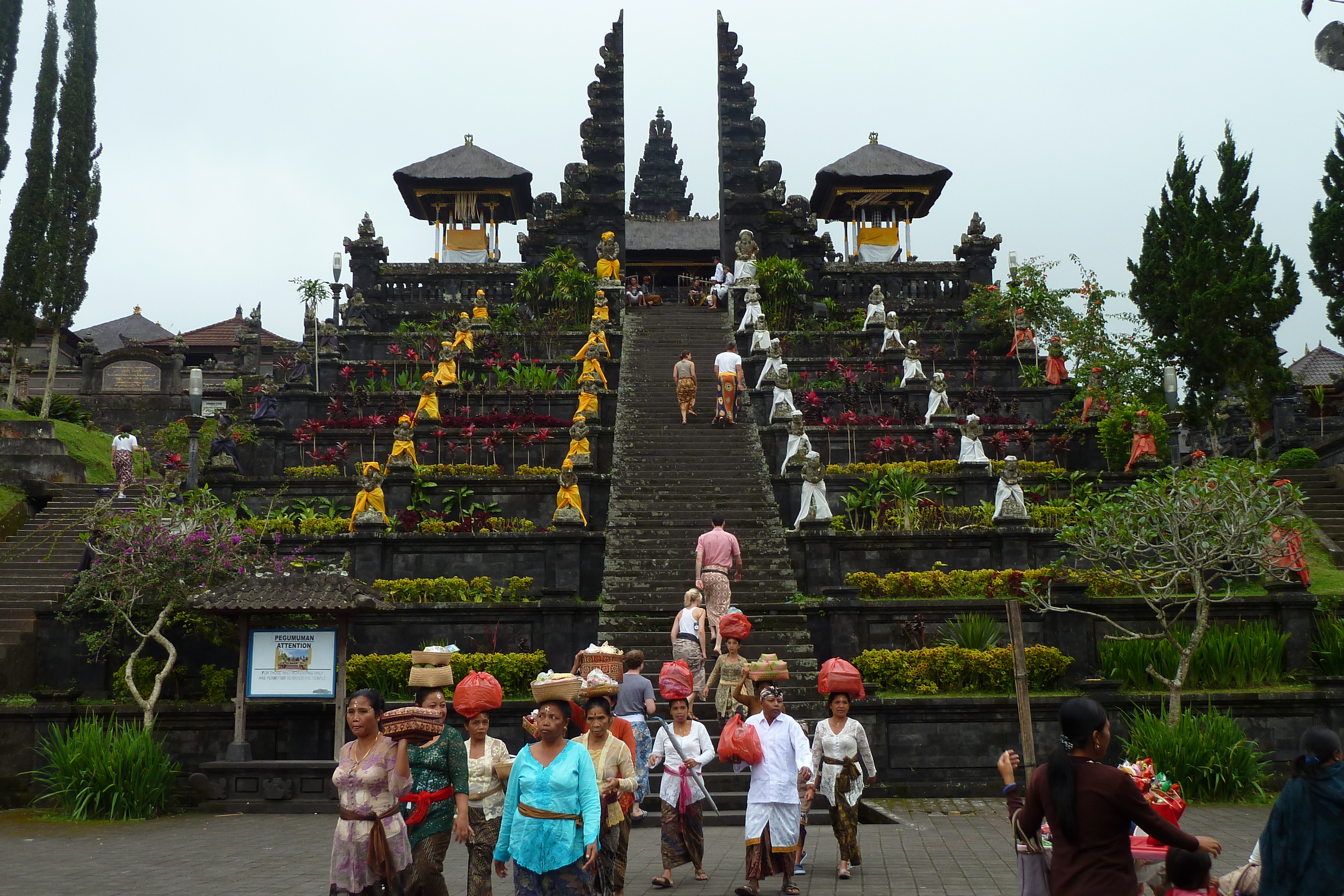 Muttertempel Pura Besakih auf Bali